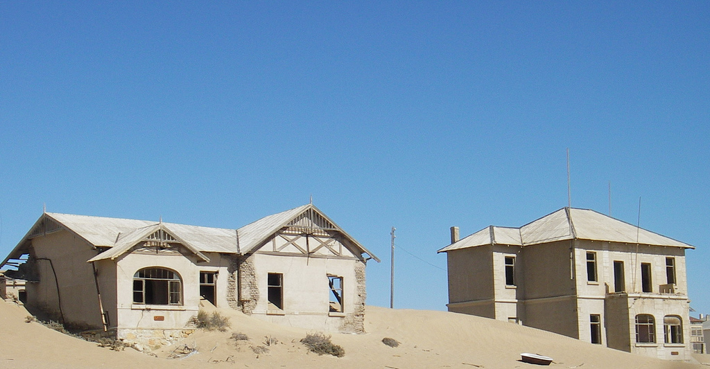 Kolmanskop ciudad abandonada del Namib